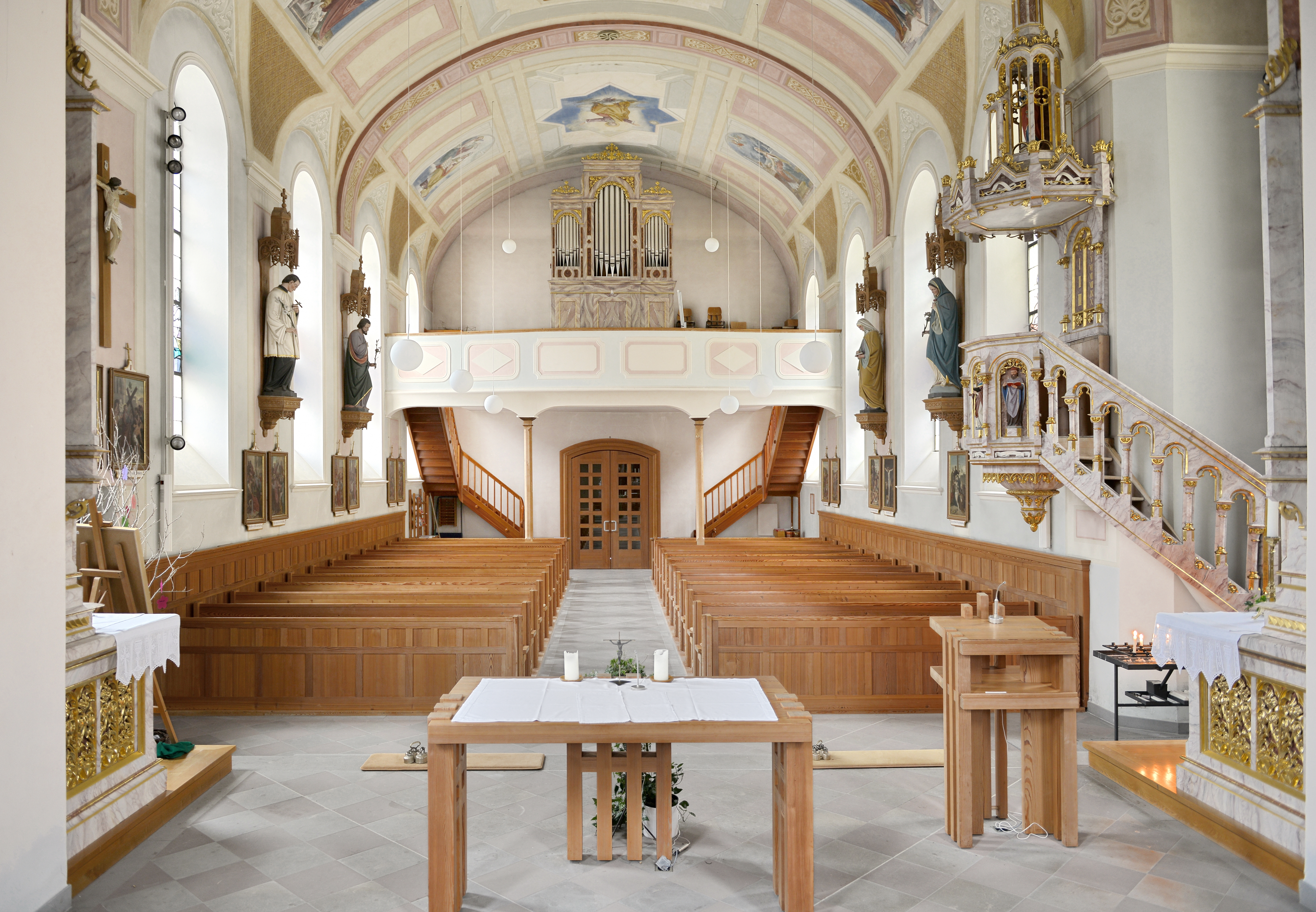 Pfarrkirche hl. Wolfgang, von Schnepfau.